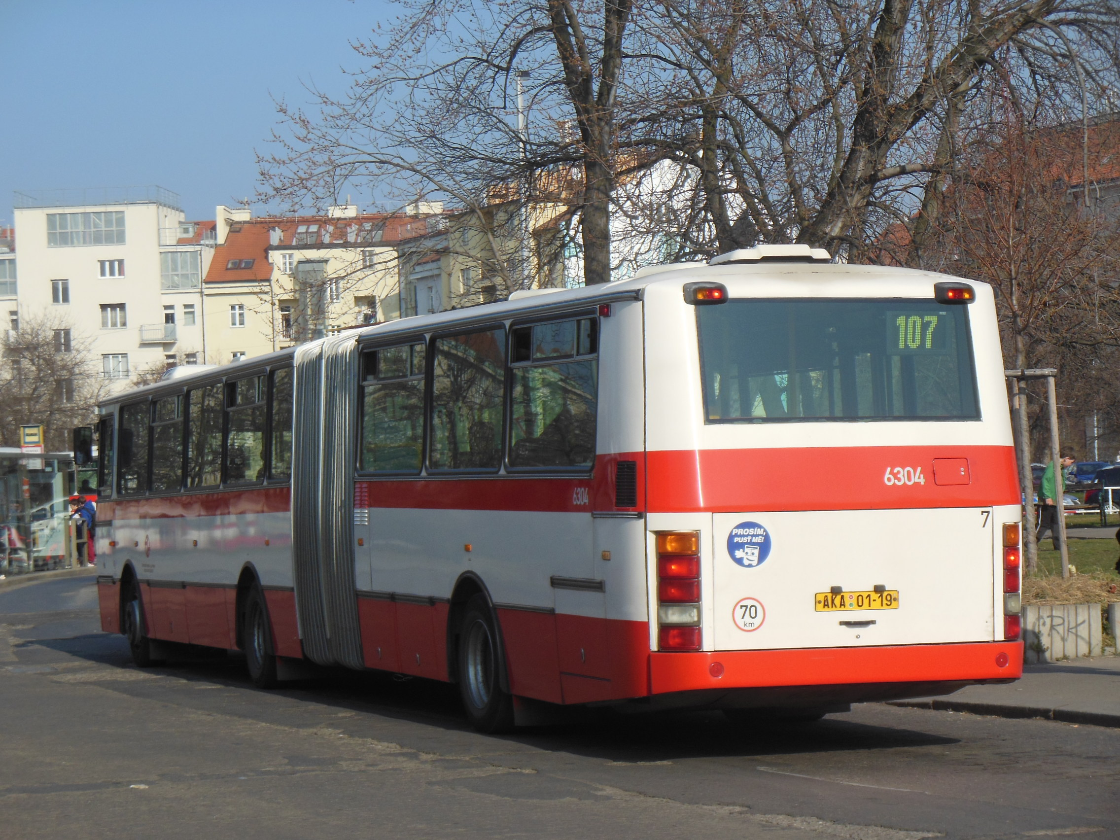 Praha-Dejvice. Autobusový terminál na Vítězném náměstí, autobus Karosa B 941.